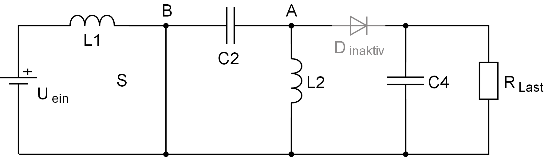 Ersatzschaltbild fuer den ersten Zeitabschnitt